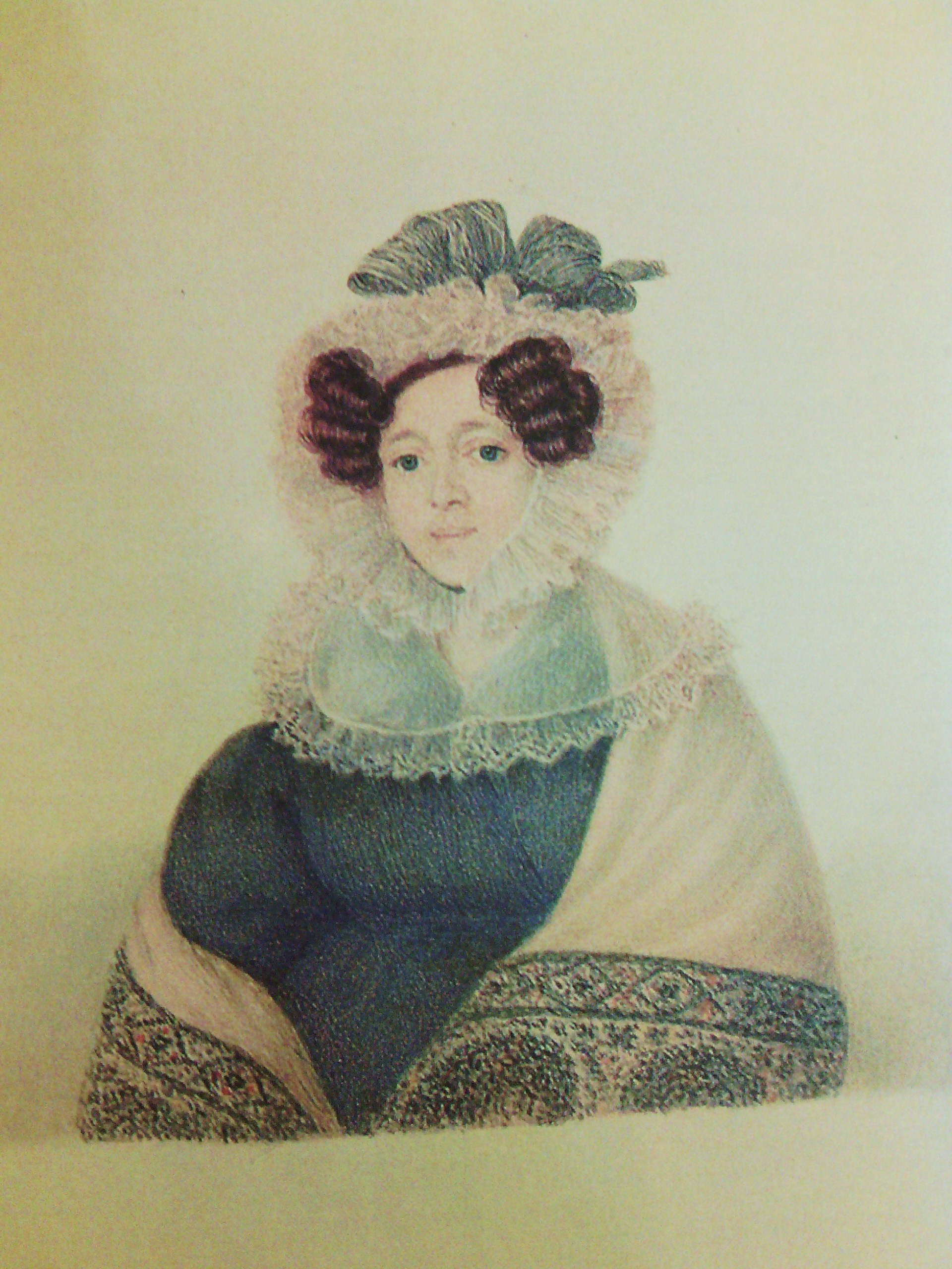 Алмазова Евдокия Петровна, ур. Зубкова, ее сын Борис Алмазов (1827-1876), известный переводчик и поэт-пародист